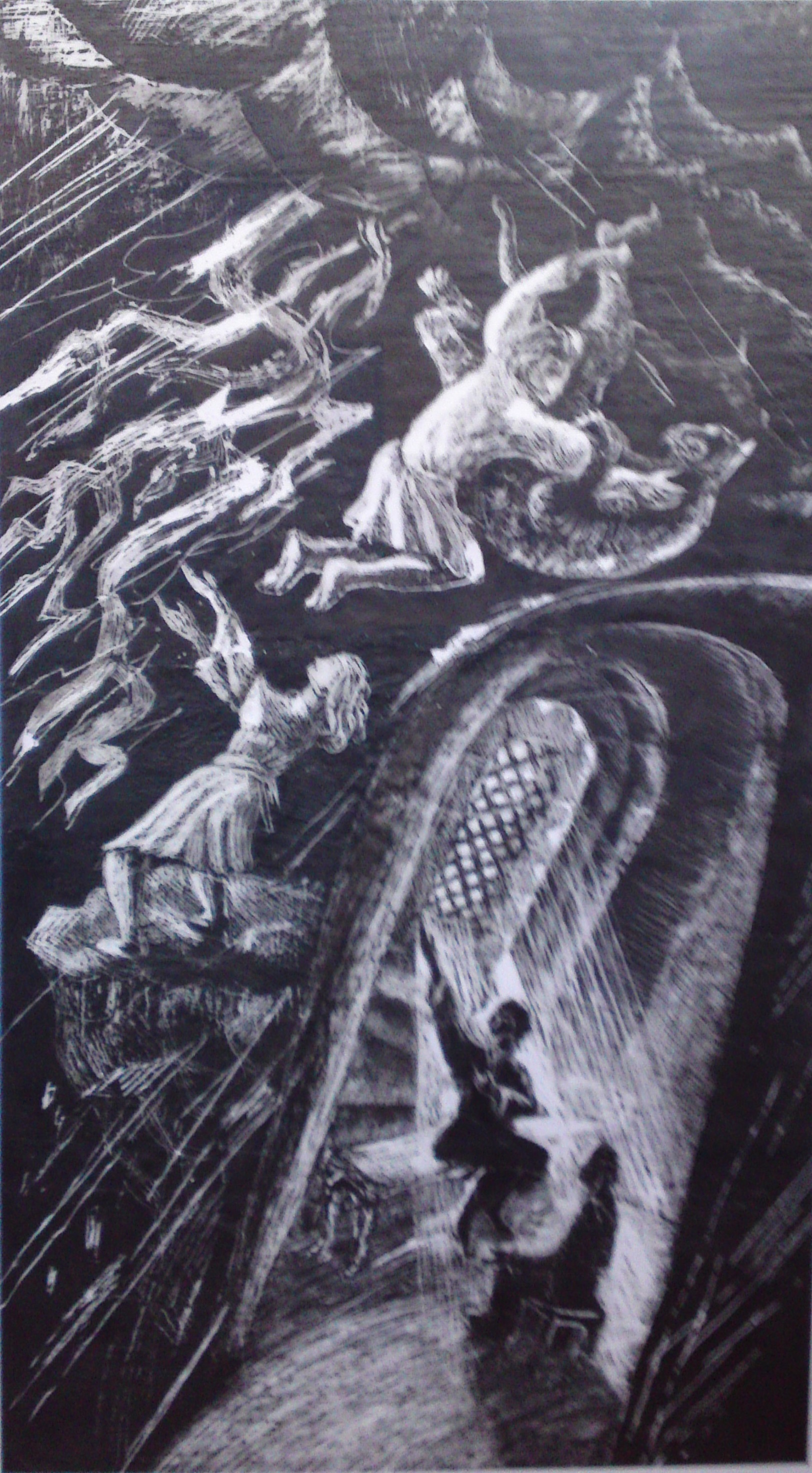 Картина по произведению М.Ю. Лермонтова: "Мцыри"